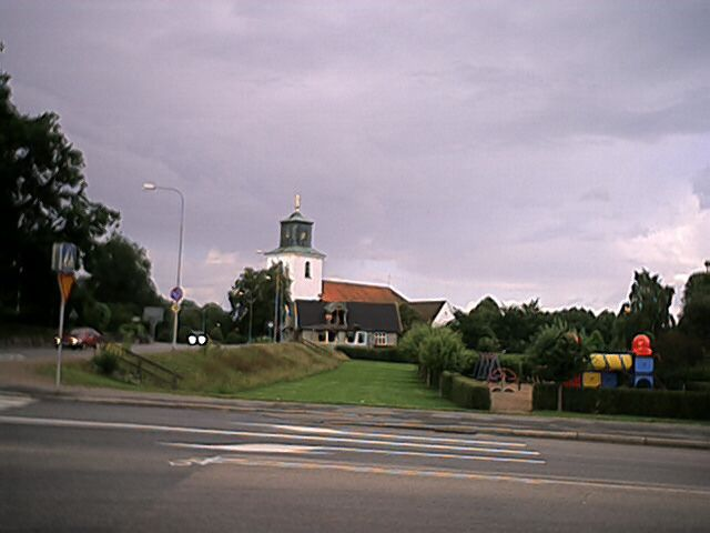 Osby kyrka i Osby.